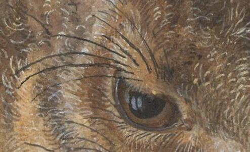 Detail oeil du lievre de Durer